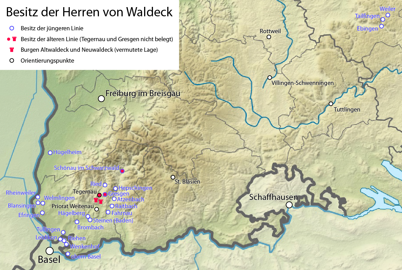 Karte des Besitzes der Herren von Waldeck im 12 Jahrhundert